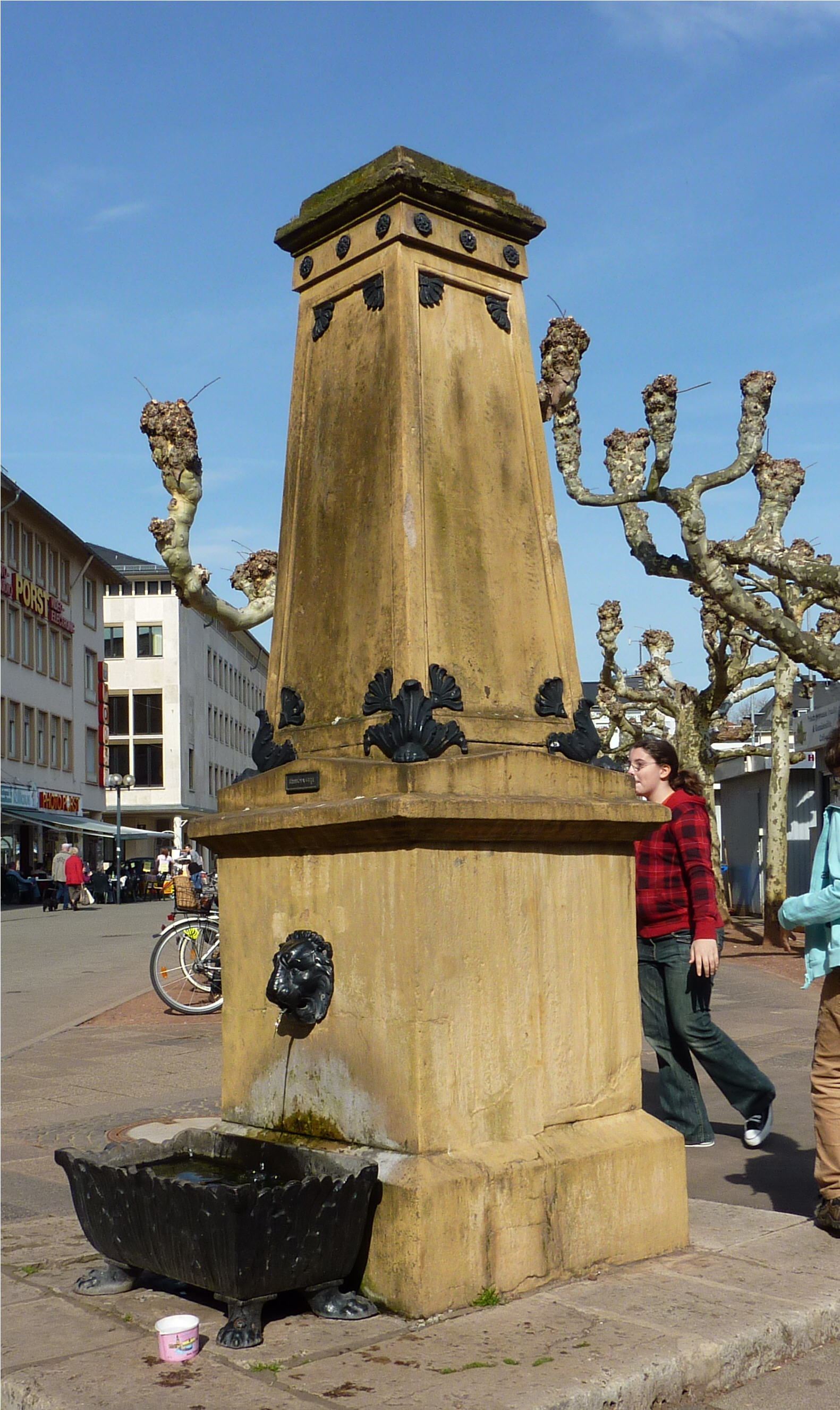 Trinkwasserbrunnen in einer Ecke des Großen Marktes in Saarlouis